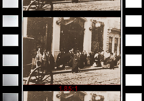 Salida fábrica (Saída do Pessoal Operário da Fábrica Confiança), 1896. Las primeras imágenes rodadas en Portugal. Orígenes del cine portugués.